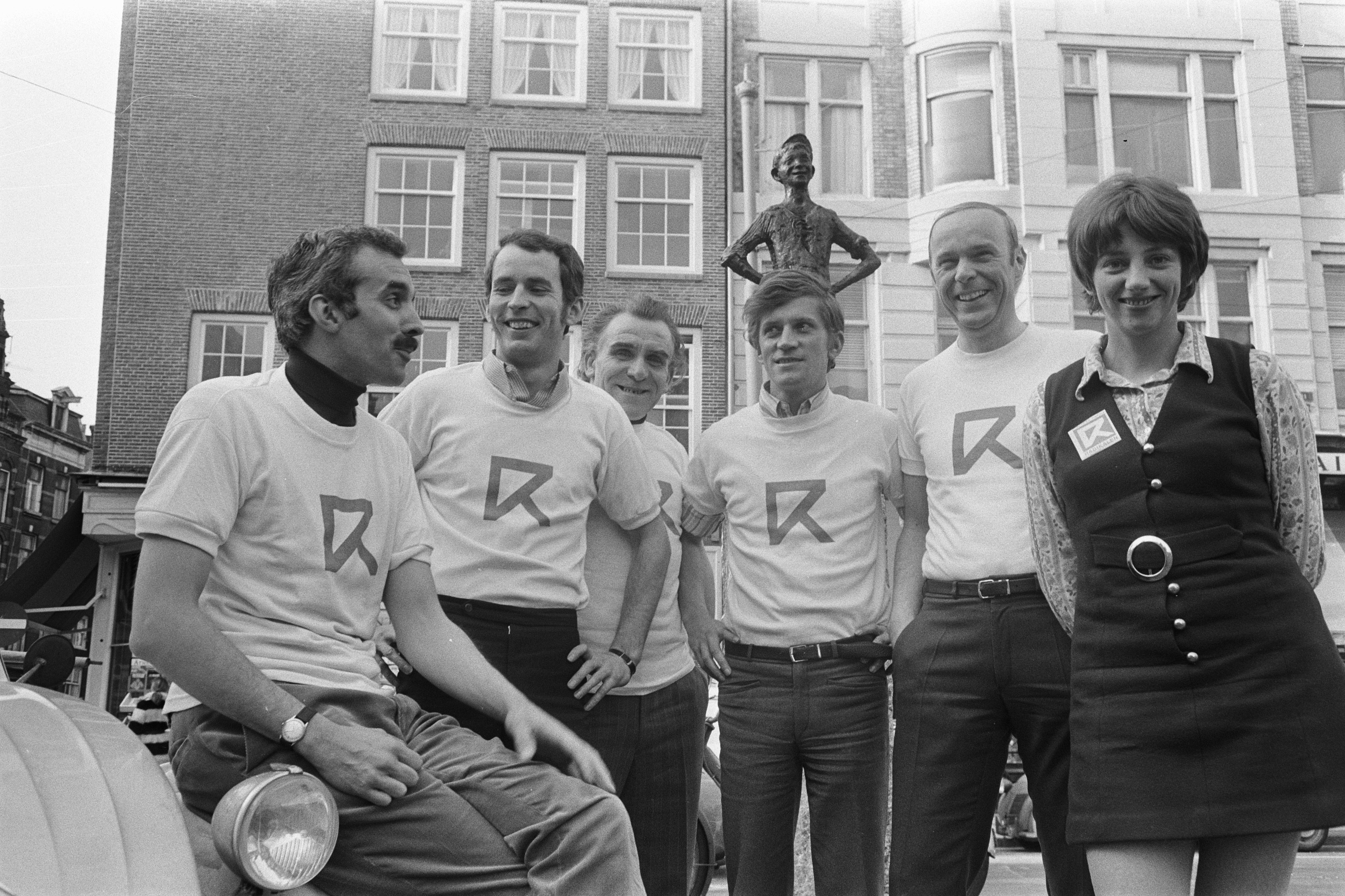 Collectie / Archief : Fotocollectie Anefo Reportage / Serie : PPR-kandidaten voor gemeenteraadsverkiezingen in Amsterdam voor 't Lieverdje op het Spui Beschrijving : V.l.n.r: Erik Jurgens, Henk Branderhorst, Lou Hoefnagels, Bas van Eyndhoven, Jan Rottinghuis en Jellie Alkema Datum : 28 april 1970 Locatie : Amsterdam, Noord-Holland Trefwoorden : gemeenteraden Persoonsnaam : Alkema, Yellie, Branderhorst, Henk, Eyndhoven, Bas van, Hoefnagels, Lou, Jurgens, Erik, Rottinghuis, Jan Fotograaf : Fotograaf Onbekend / Anefo, [onbekend] Auteursrechthebbende : Nationaal Archief Materiaalsoort : Negatief (zwart/wit) Nummer archiefinventaris : bekijk toegang 2.24.01.05 Bestanddeelnummer : 923-4778